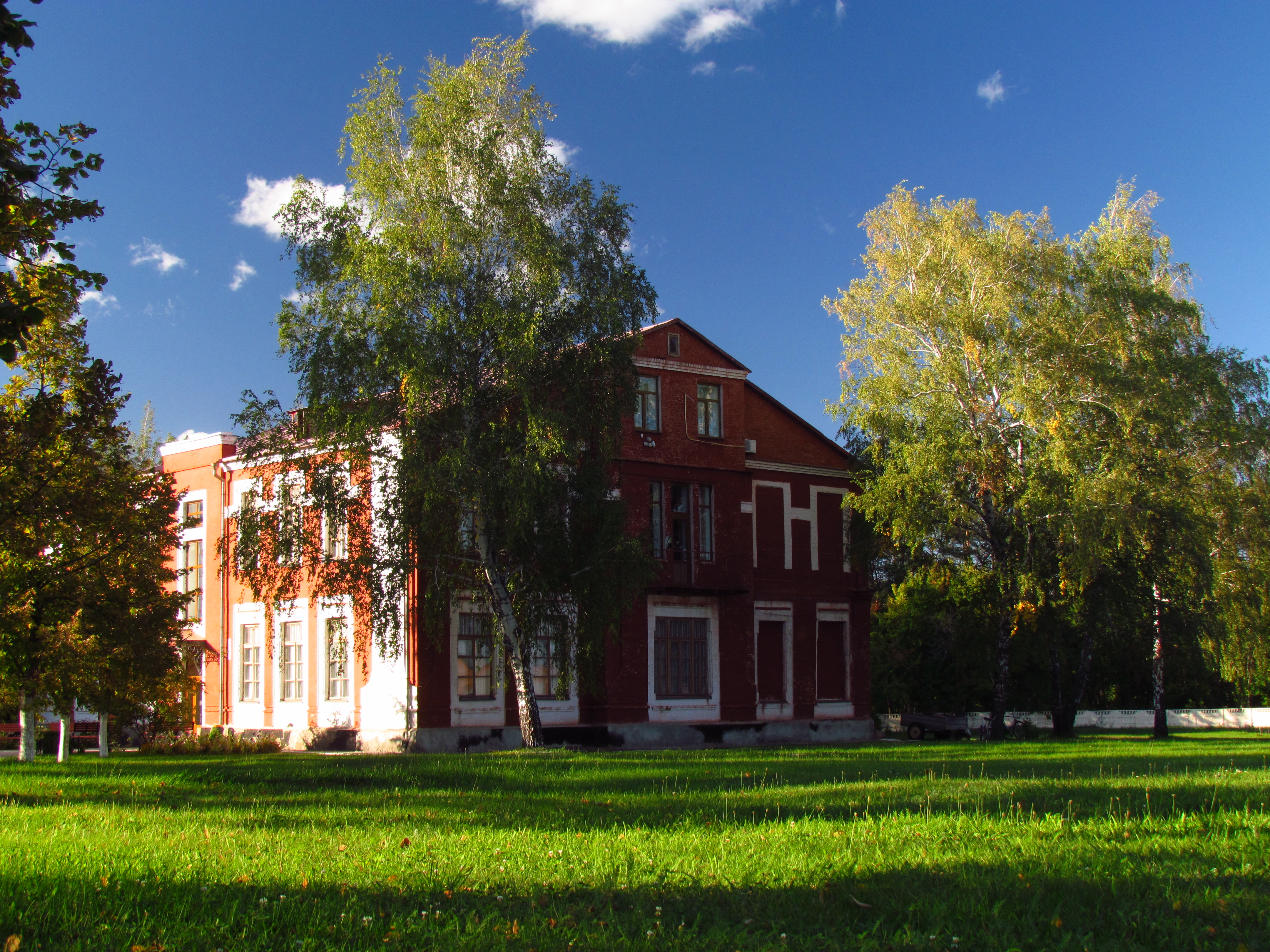 Музей-заповідник А.С.Макаренка (будівлі колишньої дитячої трудової колонії ім. М.Горького)